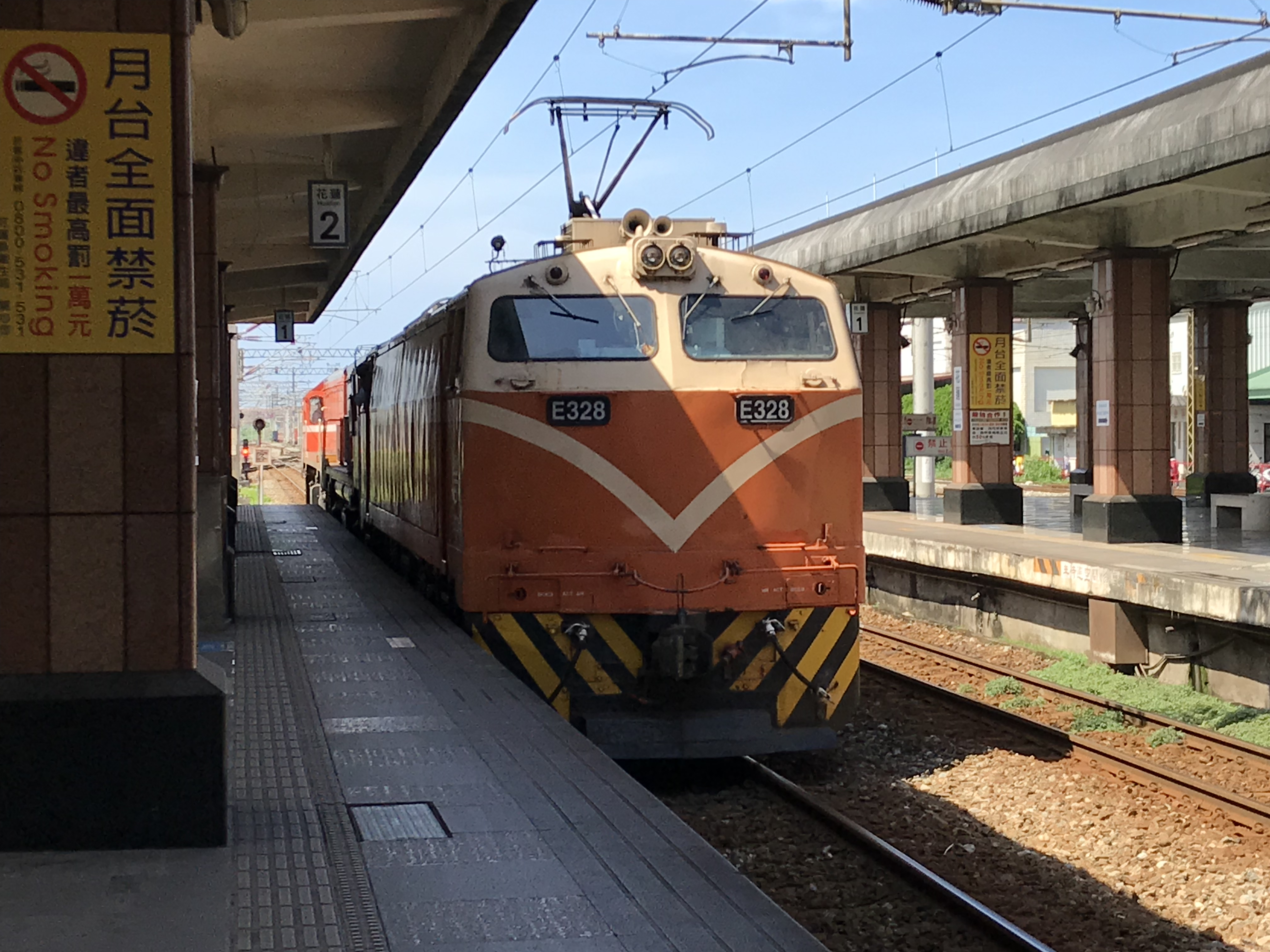 在花蓮車站拍攝的台鐵E300型電力機車（編號E328）